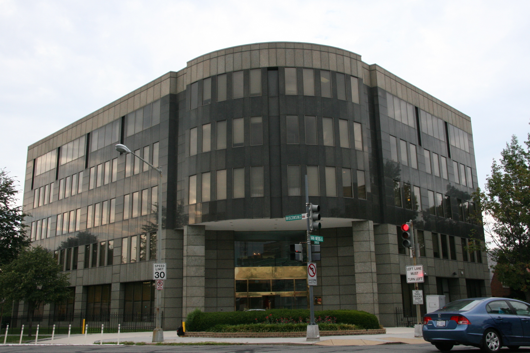 位於華盛頓威斯康辛大道的台灣駐美代表處。